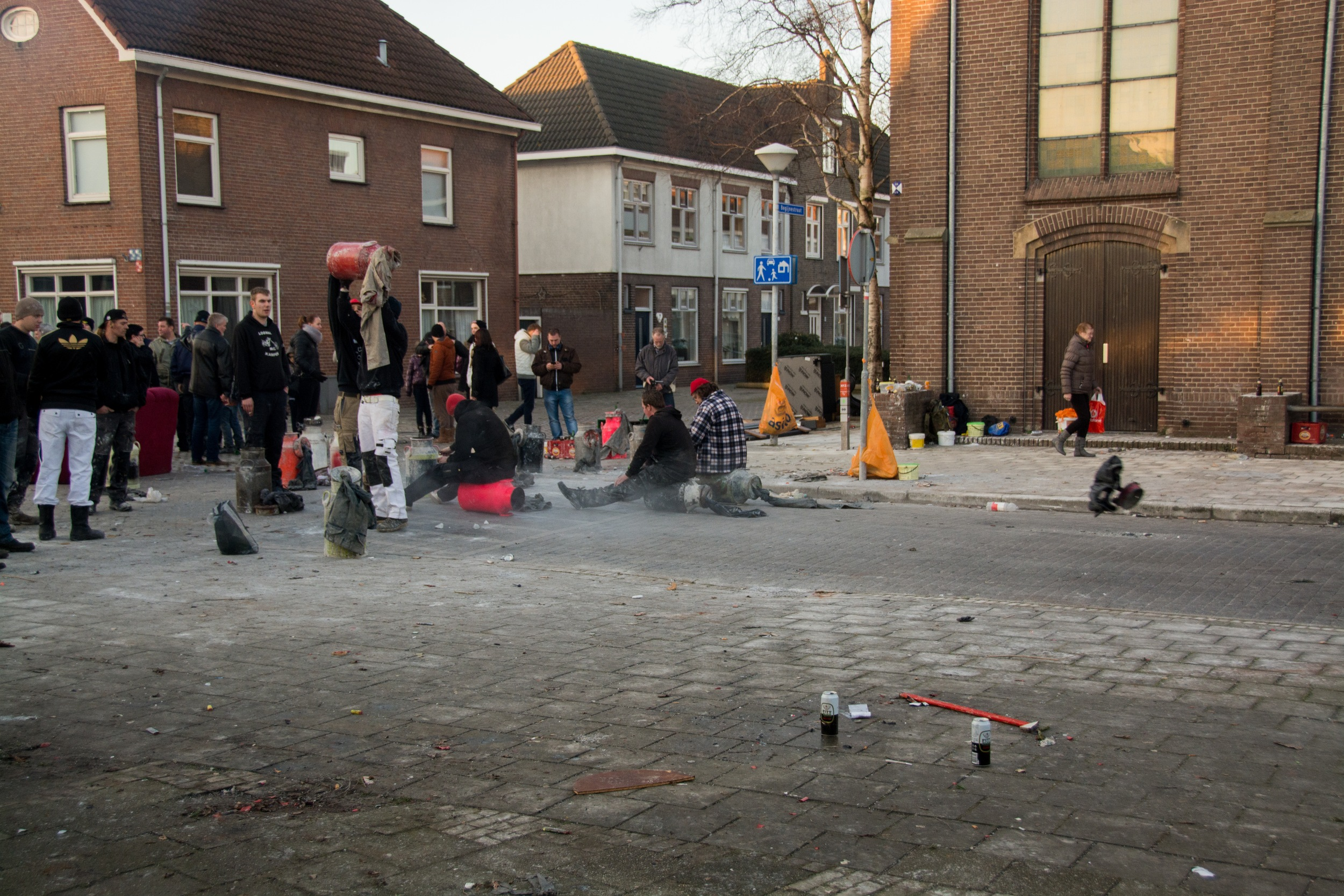 Carbid bussenschieten in Kampen.